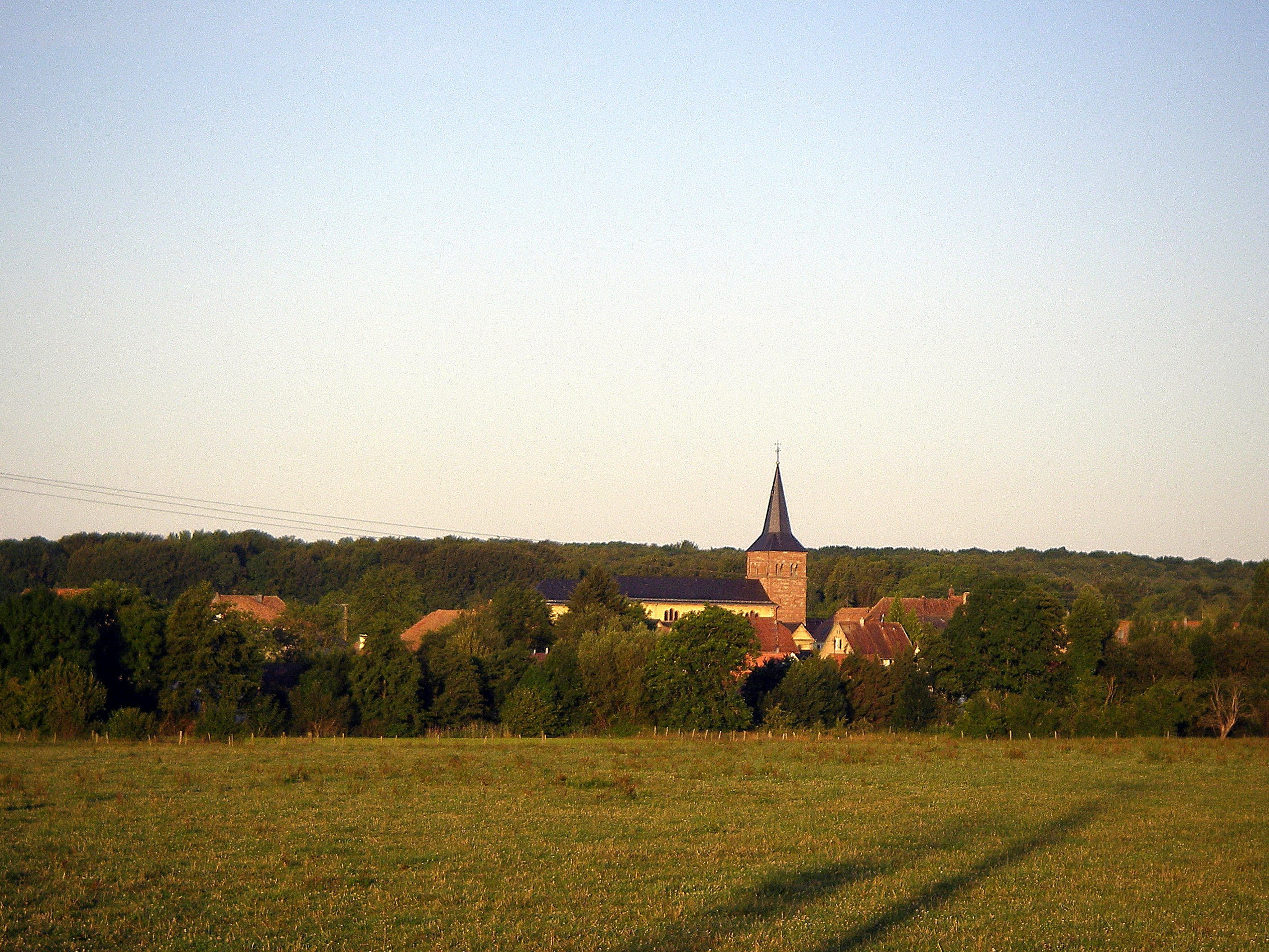 Schweighouse-Thann (Haut-Rhin, France)